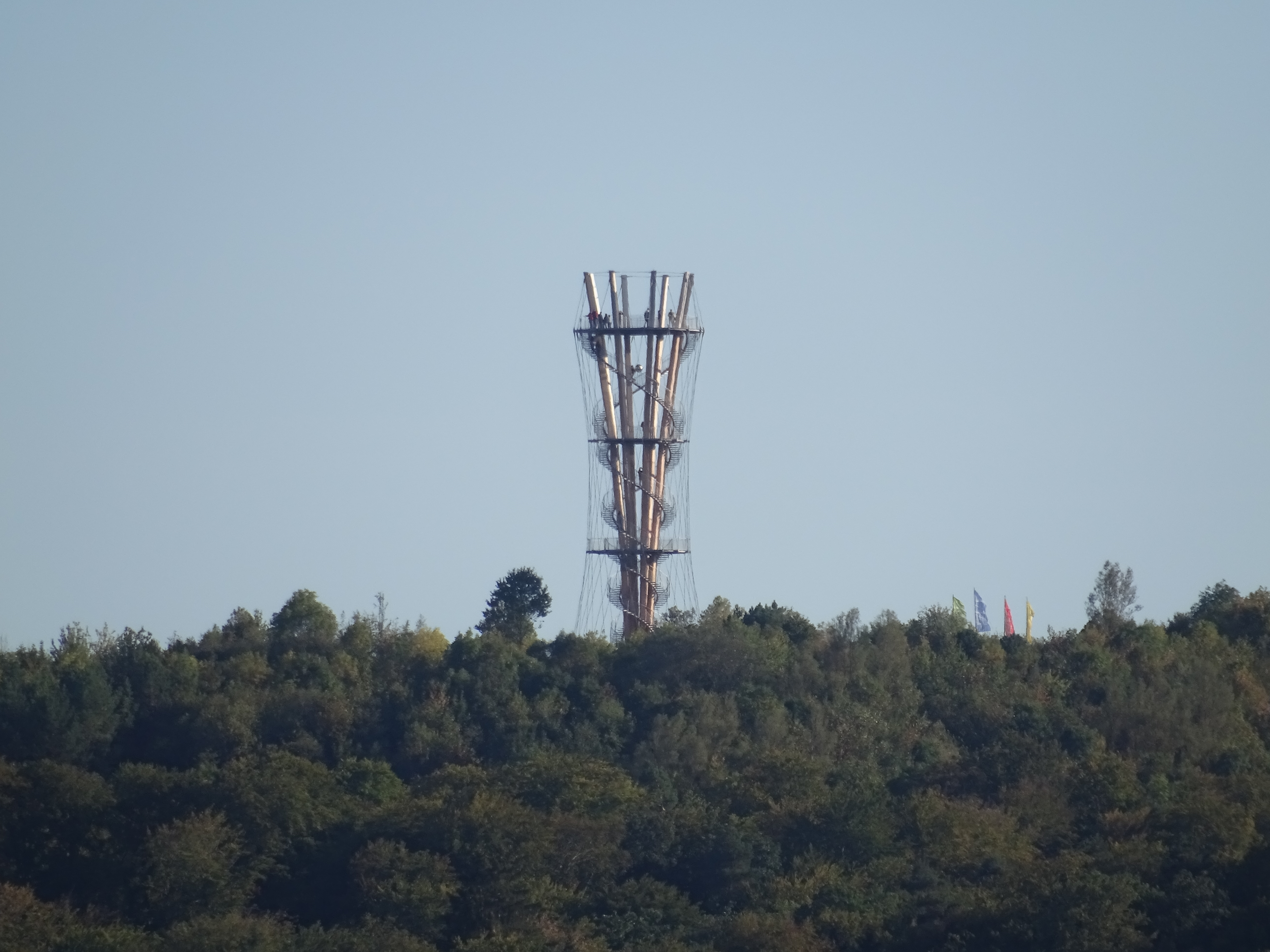 Schönbuchturm vom Gewerbegebiet Nufringen aus.